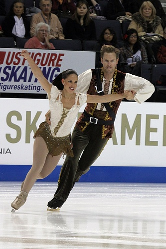 Tiffany VISE and Don BALDWINat the 2011 Skate America